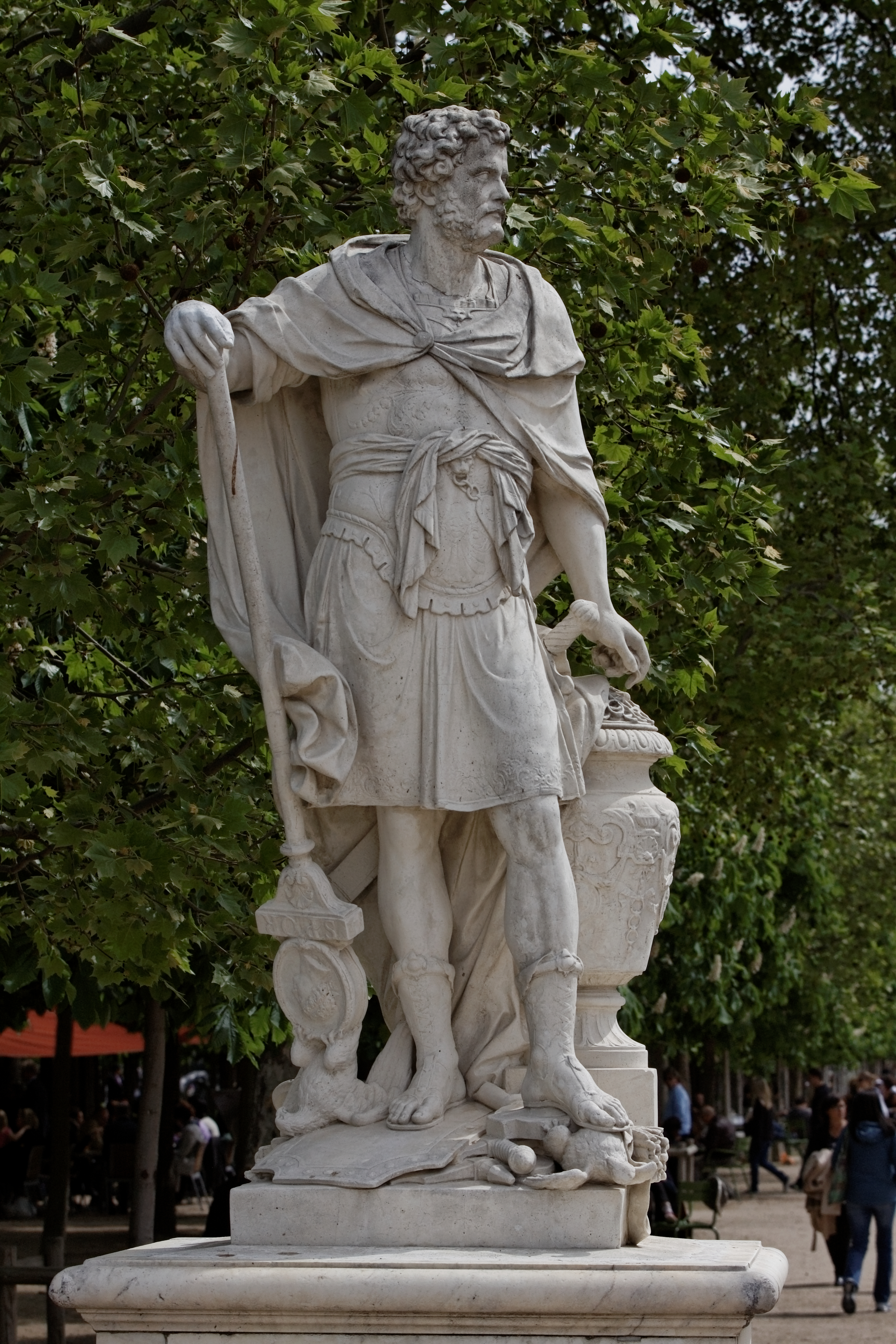 La statue d'Hannibal dans le jardin des Tuileries à Paris.